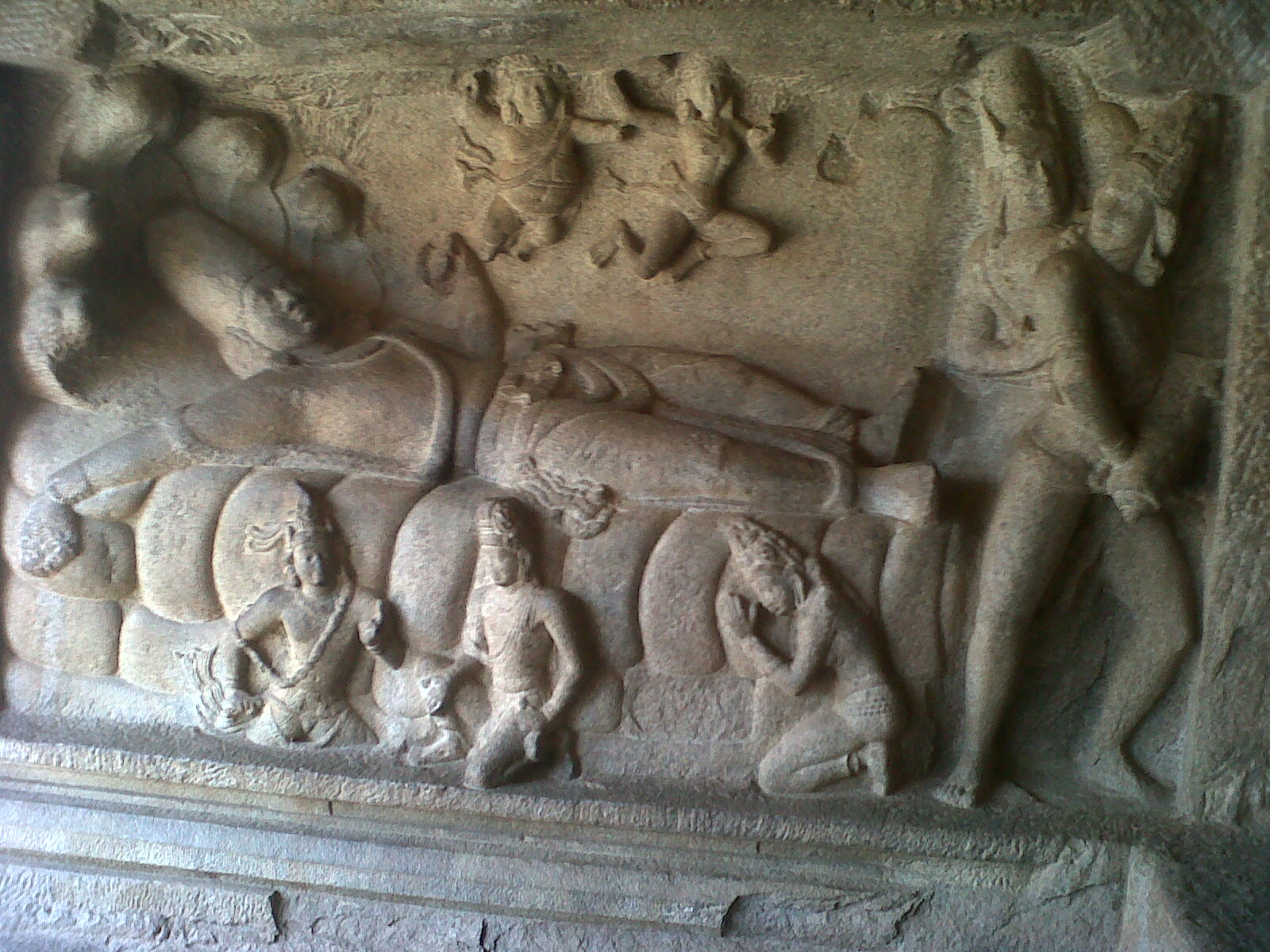 Vishnu sculpture at Mahabalipuram